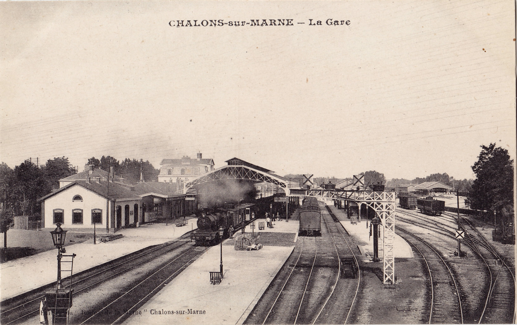 carte postale ancienne, avec une mention d'éditeur illisible : CHALONS-SUR-MARNE - La Gare